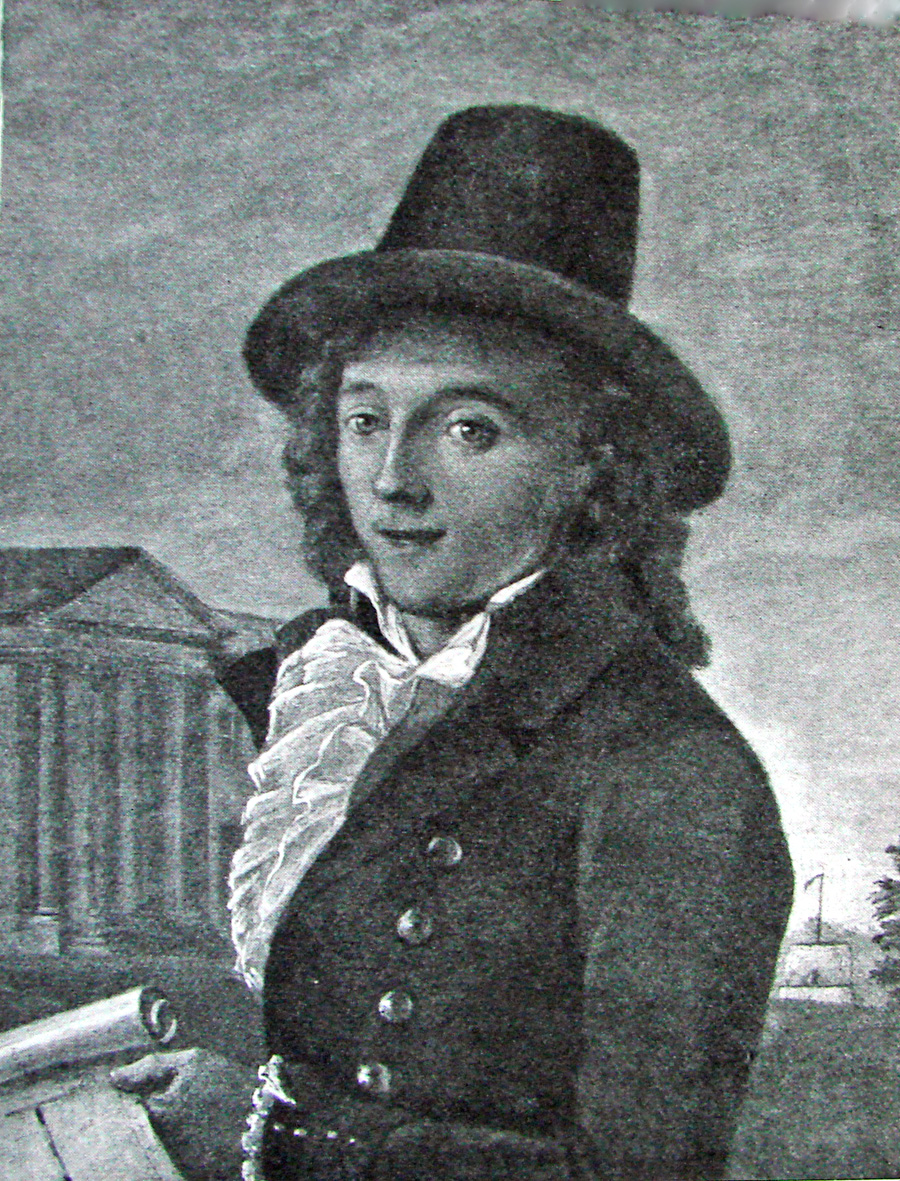 Axel Bundsen (1768-1832), dansk arkitekt. en: Danish architect Axel Bundsen (1768-1832).